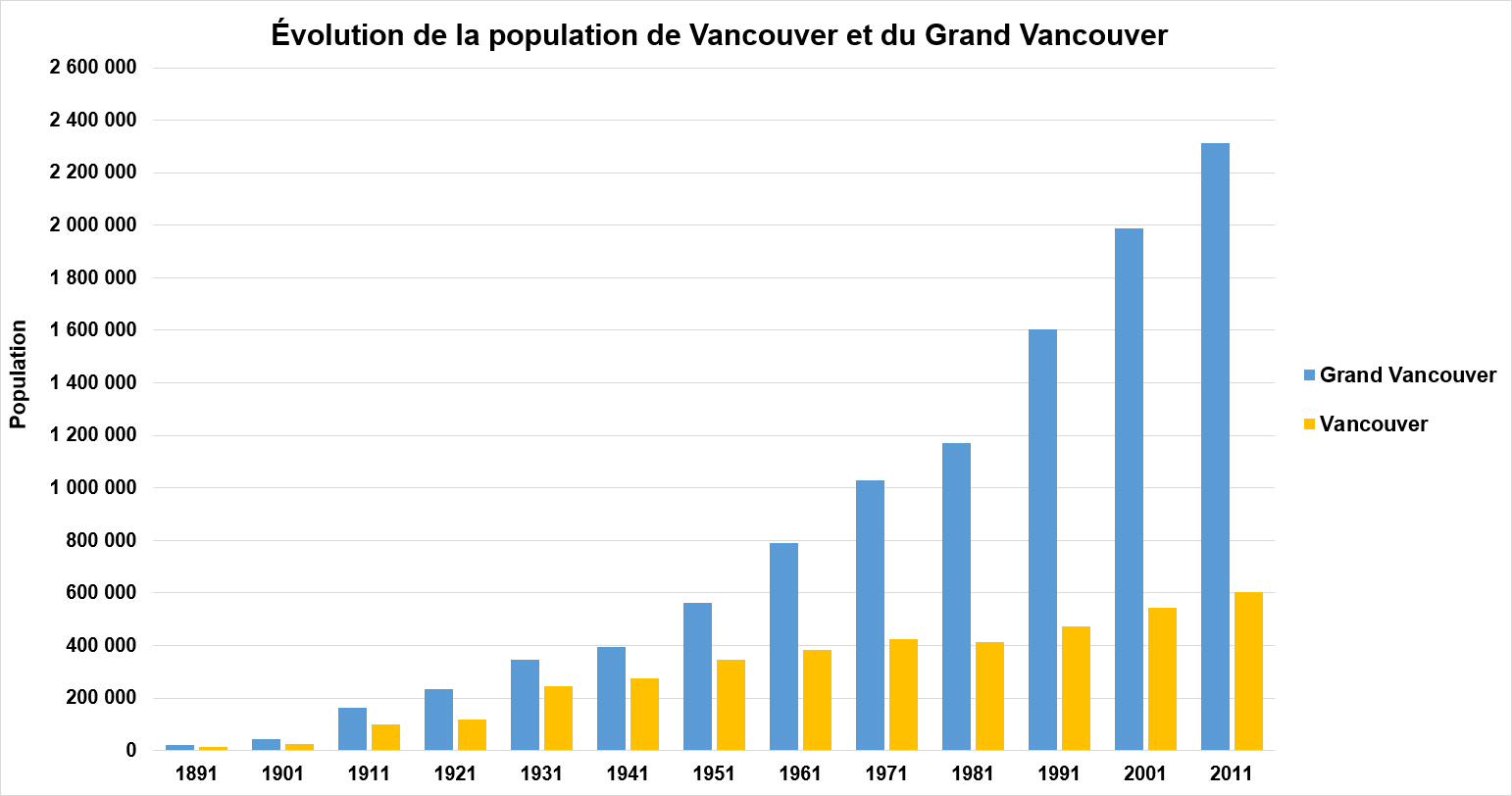 Évolution de la population de Vancouver depuis 1891. Chiffre issu de File:VanPop.jpg basé sur les données de recensement.